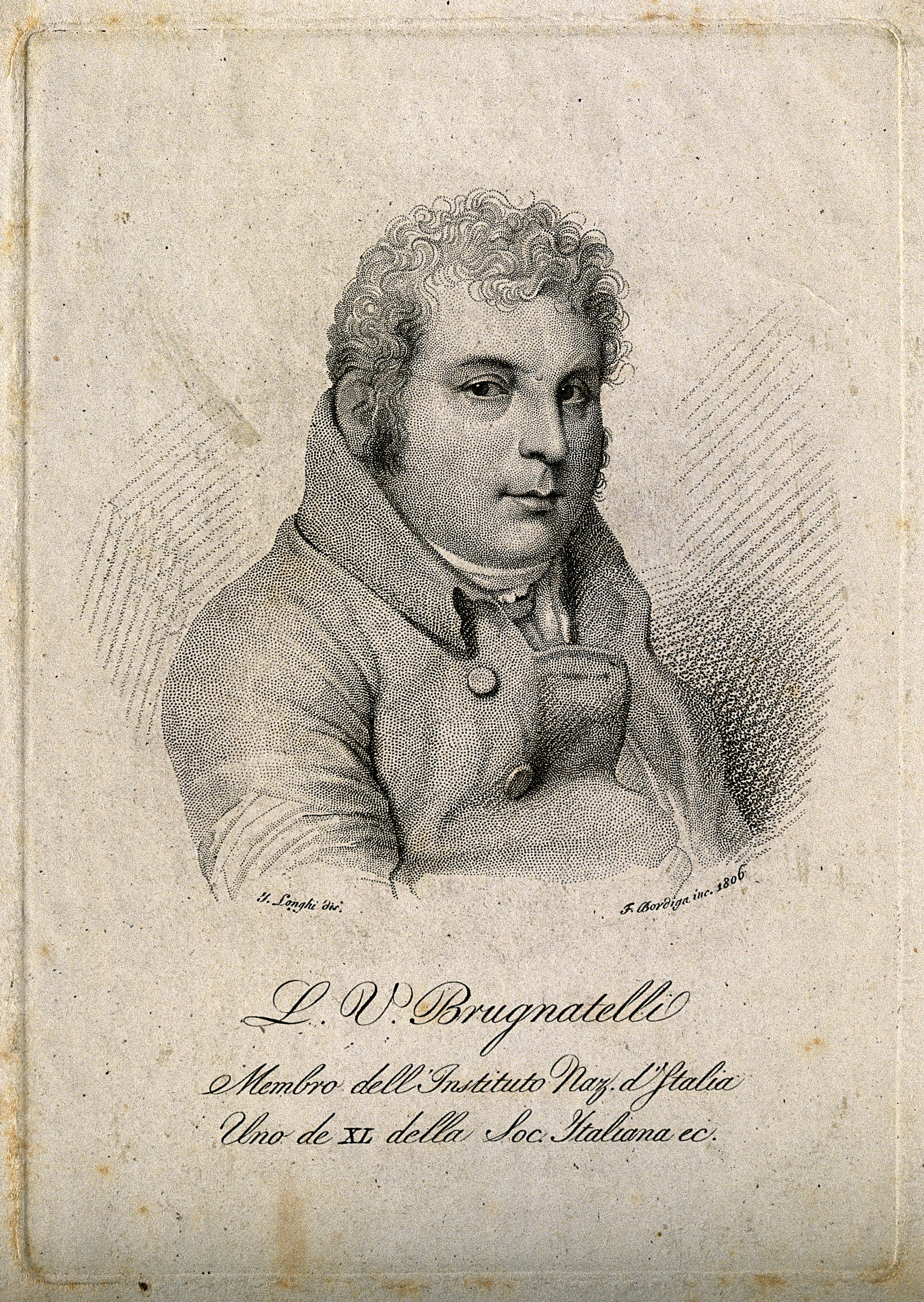 Luigi Valentino Brugnatelli. Stipple engraving by F. Bordiga, 1806, after G. Longhi. Iconographic Collections Keywords: brugnatelli, luigi valentino,; portrait prints; Luigi Valentino Brugnatelli; stipple prints